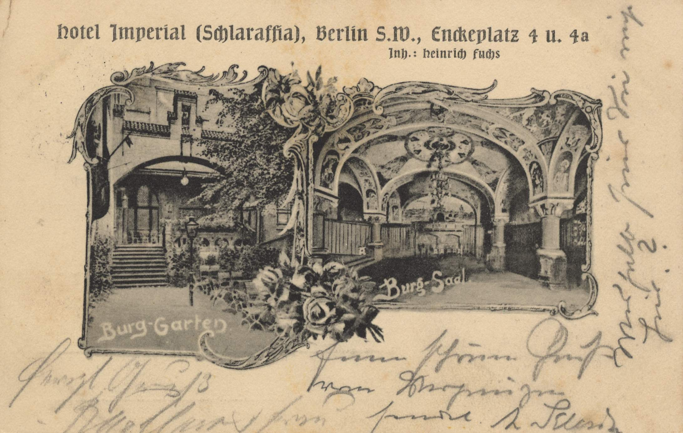 Hotel Imperial (Schlaraffia), Enckeplatz 4-4a, Berlin-Kreuzberg